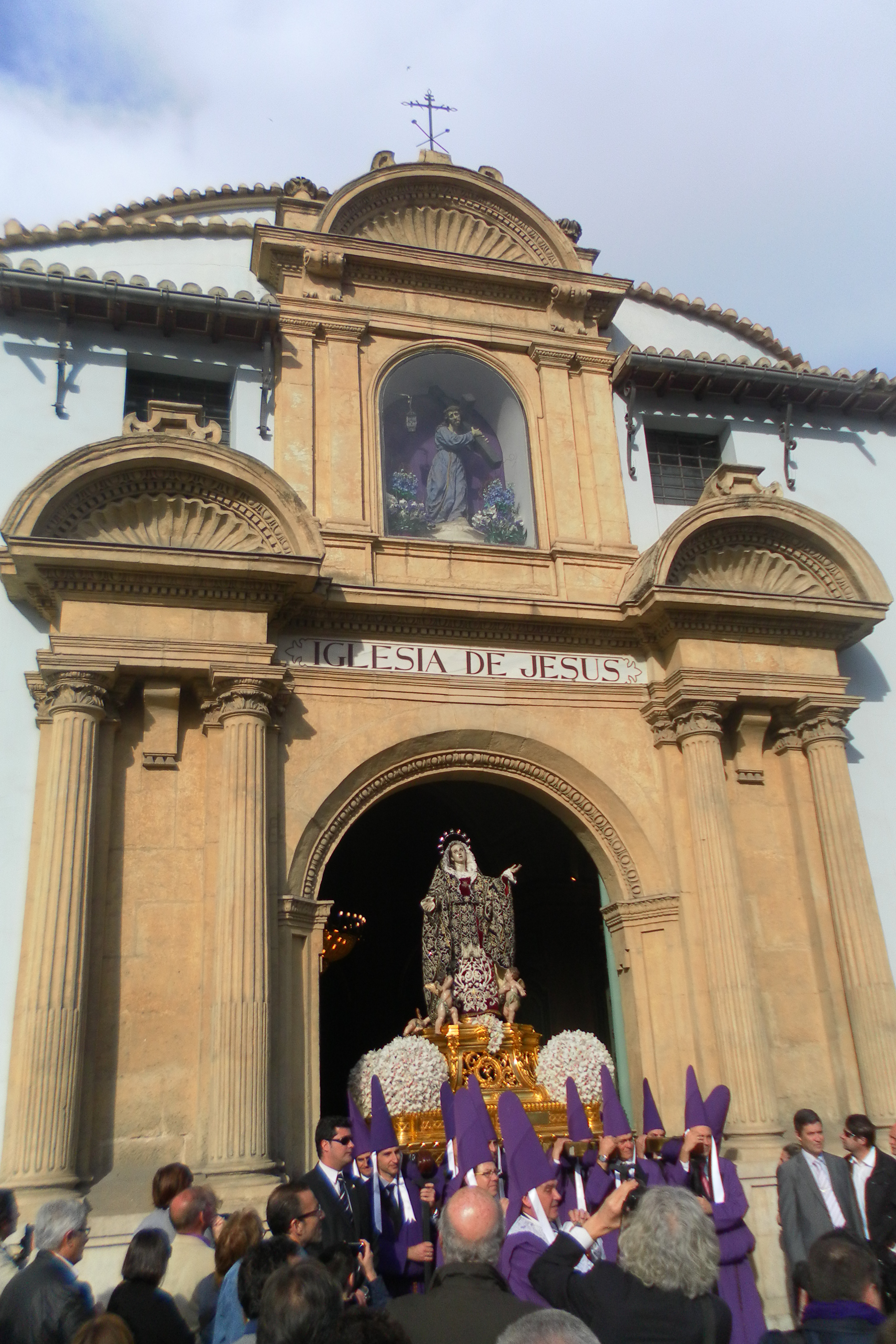 Portada de la Iglesia de Jesús de Murcia (España) en el momento de la salida de la Dolorosa de Salzillo en la mañana de Viernes Santo.